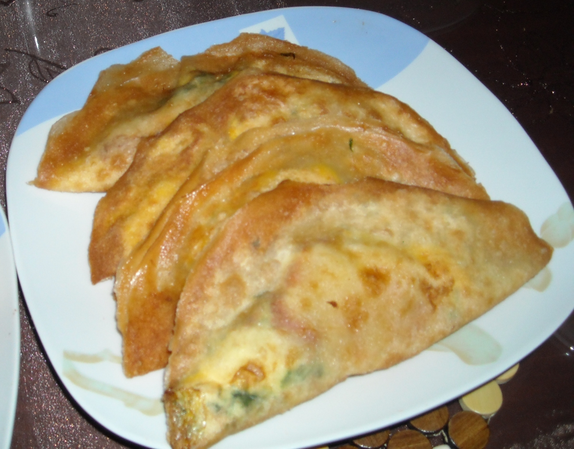 Briks à la tunisienne